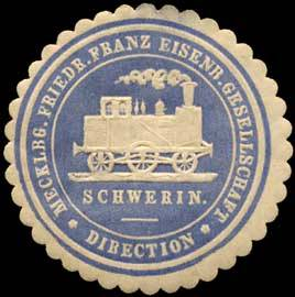 Siegelmarke Direction Mecklenburgische Friedrich-Franz-Eisenbahn Schwerin